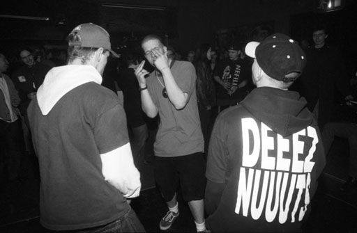 Hip-Hopper im Tanzcafe LiBella, Altenmarkt an der Alz, Februar 1997